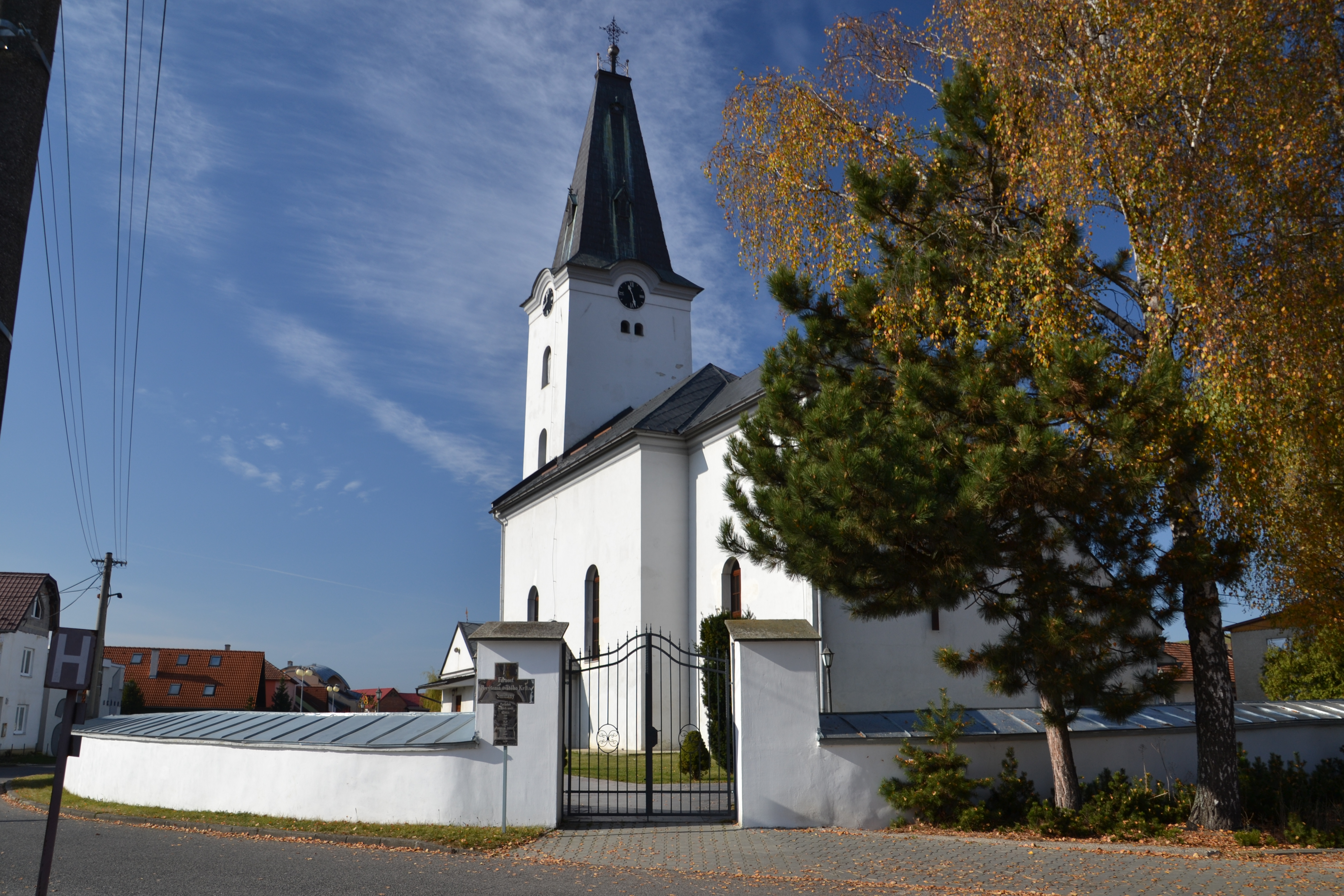 Kostol Povyšenie sv. Kríža, Smižany